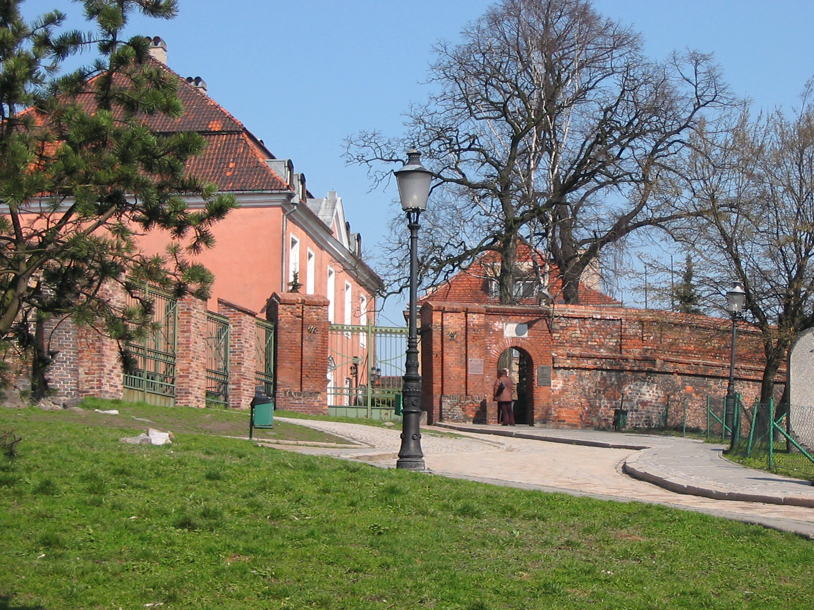 Zamek królewski w Poznaniu. Zdjęcie wykonane dnia 25 marca 2007. Royal Castle in Poznań (Poland). Photo was taken 25th March 2007. Autor: Piotrm00